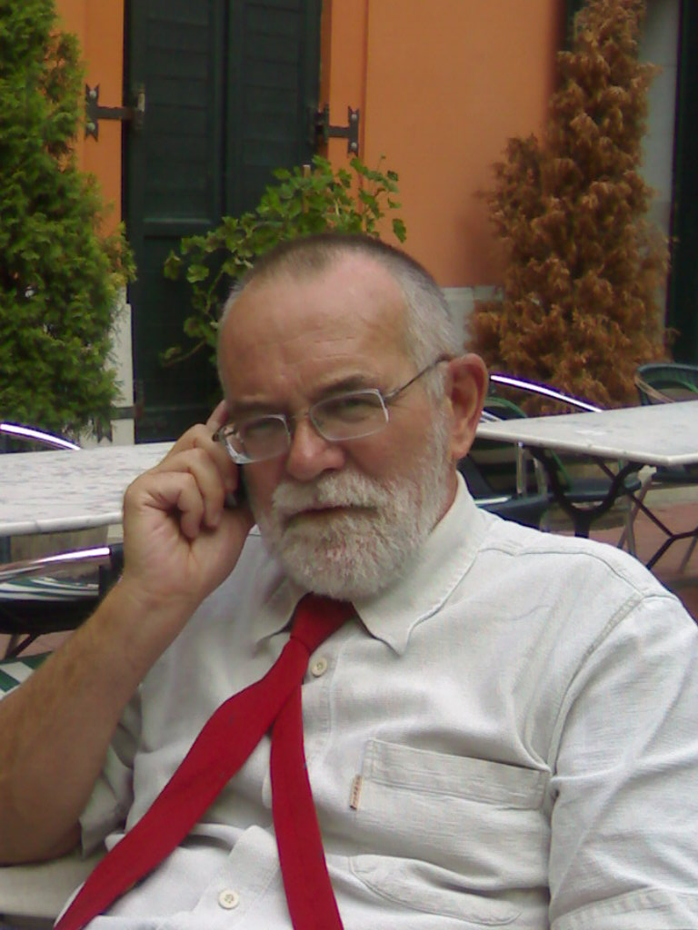 Csaba Pléh academician